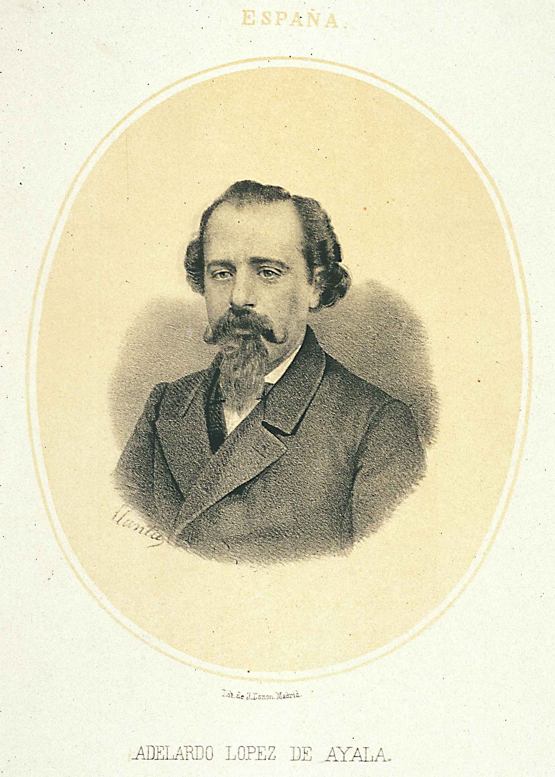 Título: Retrato de Adelardo López de Ayala Publicación: Madrid / Lit. de J. Donon , 1867 1 estampa : litografía ; imagen oval 176 x 138 mm Notas: Inscripción: "ADELARDO LOPEZ DE AYALA" Estampa suelta de: Galeria universal de biografías y retratos de los personajes más distinguidos... desde 1848 hasta nuestros días con un resumen histórico, geográfico, estadístico, industrial y político de cada nación. Madrid, 1867 Iconografía Hispana 4968-4 - Barcia Retratos conservados en la B.N.